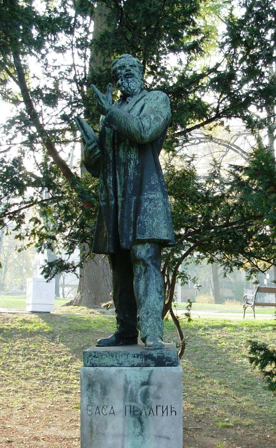 Васа Пелагић у Карађорђевом парку, Београд. Сликао Голдфингер